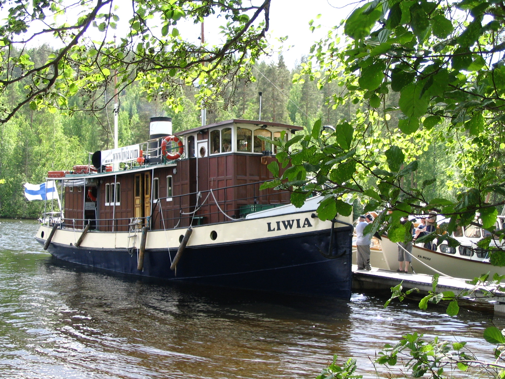 Liwia Keiteleellä Viukarin saaressa